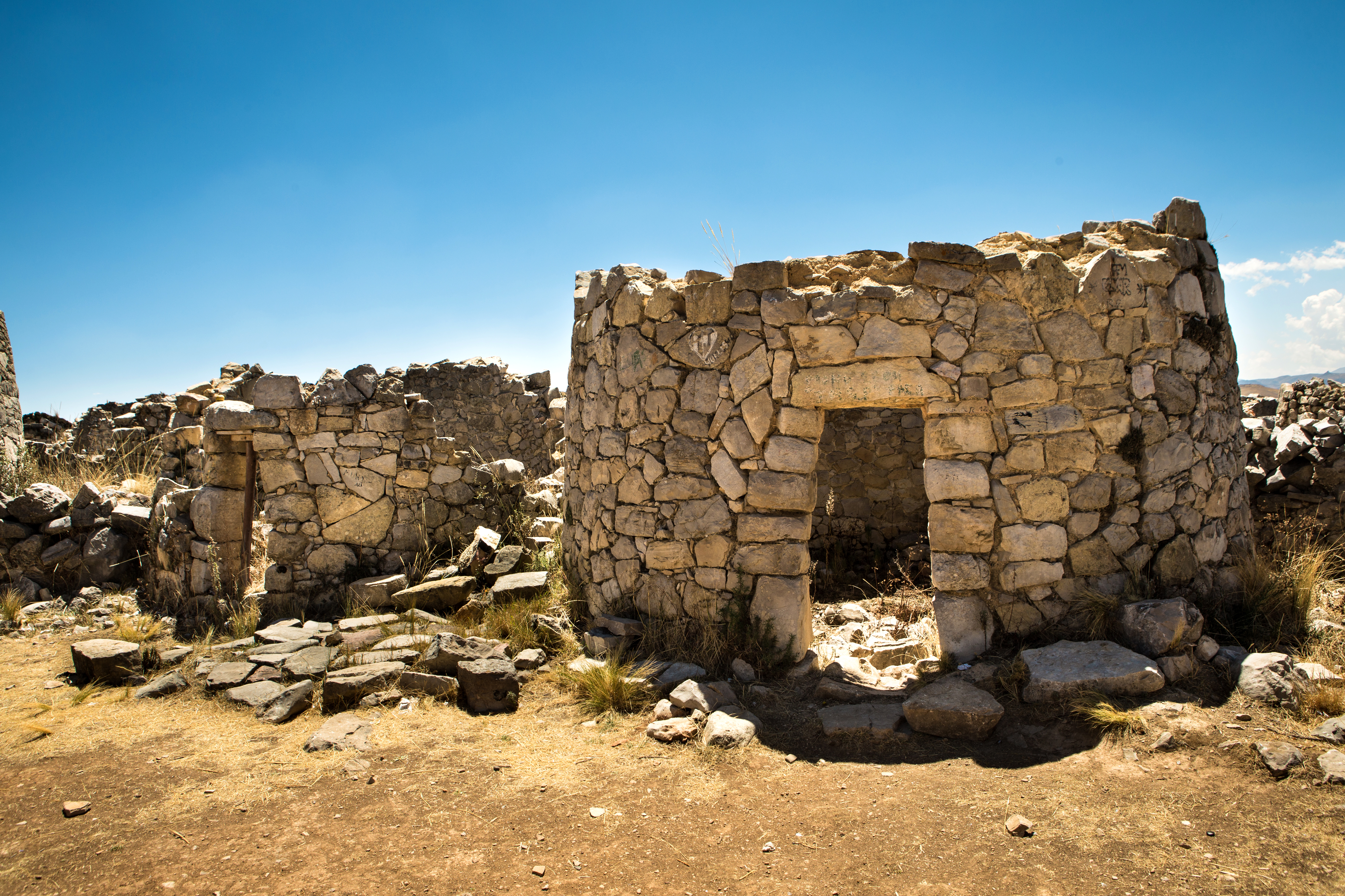 Tipo de vivienda circular en el complejo Arqueológico de Tunanmarca